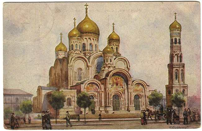 Sobór na Placu Saskim, postcard